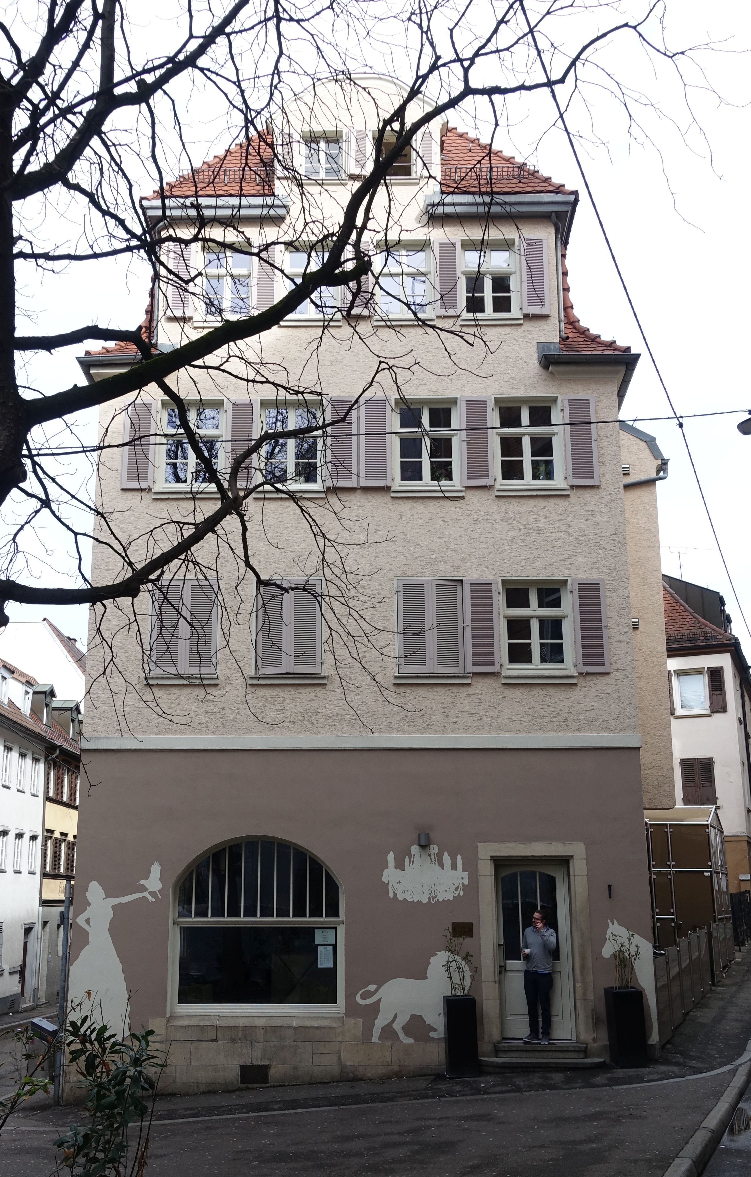 Haus Leonhardstraße 13, Stuttgart, Haus Leonhardstraße 13, Stuttgart, Blick vom Wilhelmsplatz, Foto, Architekt: Theodor Fischer, 1906.